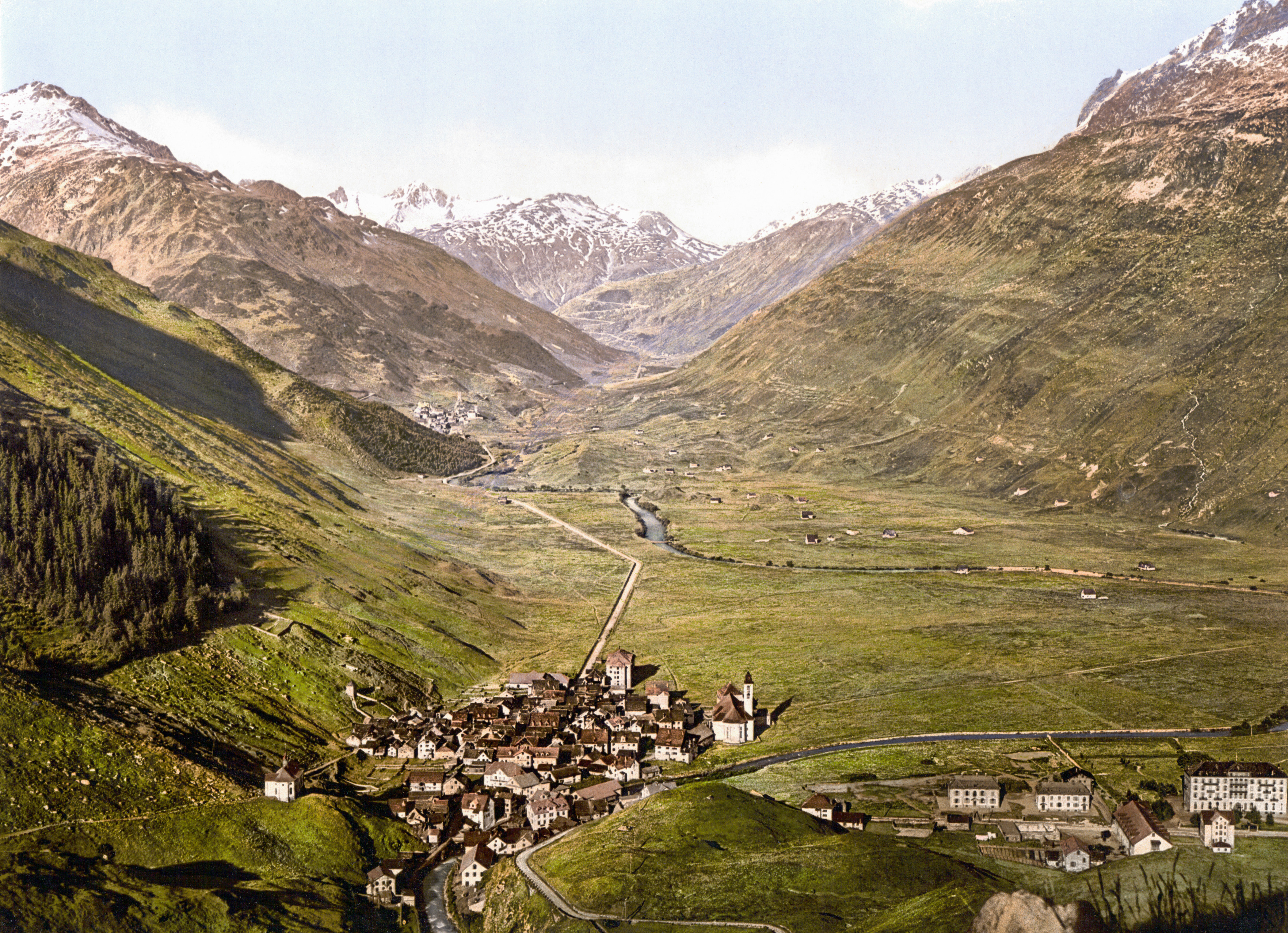 Andermatt um 1900, rechts unten Neubau der Friedenskaserne (1897-1900)